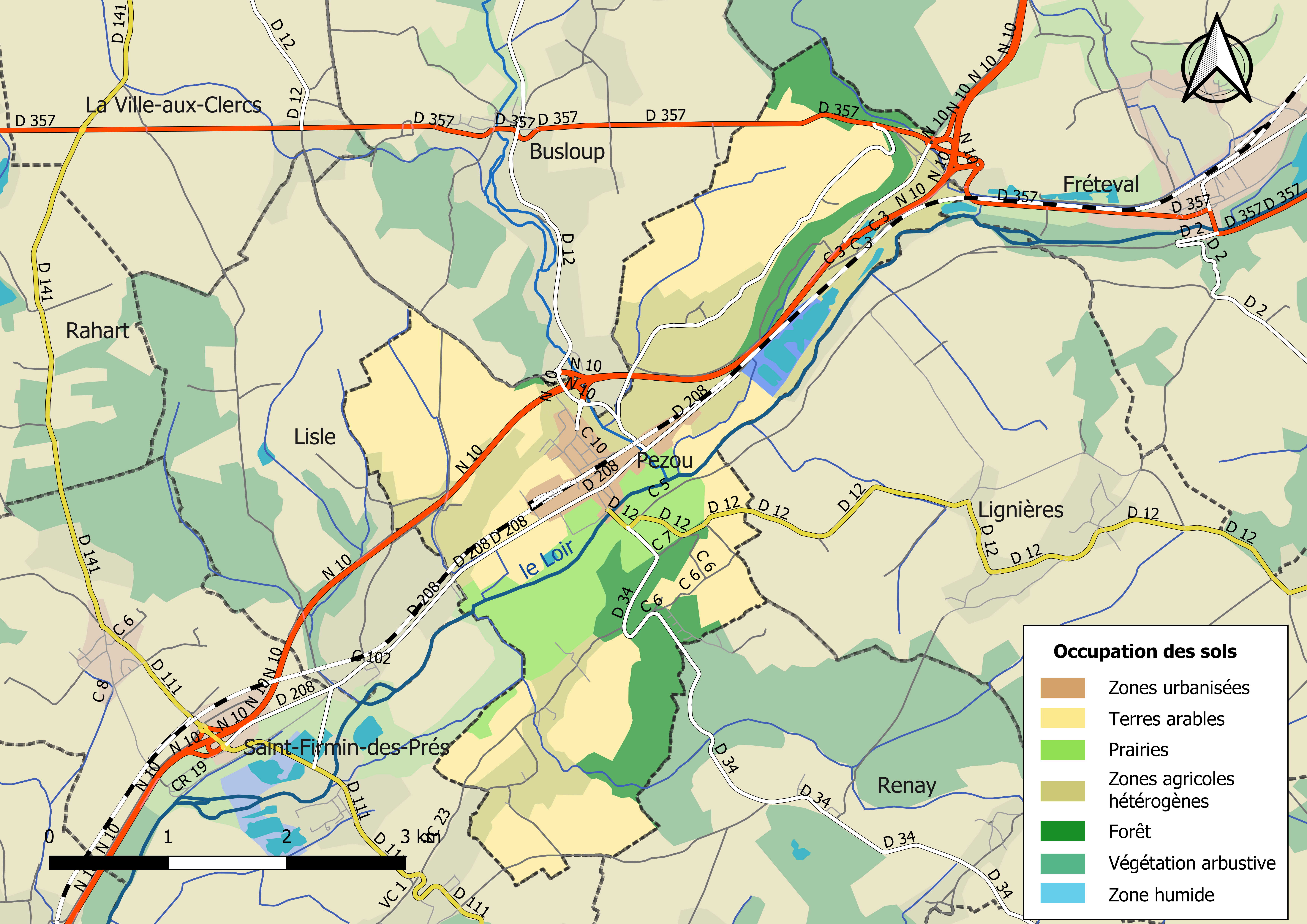 Carte des infrastructures et de l’occupation des sols en 2018 de la commune de Pezou (France).